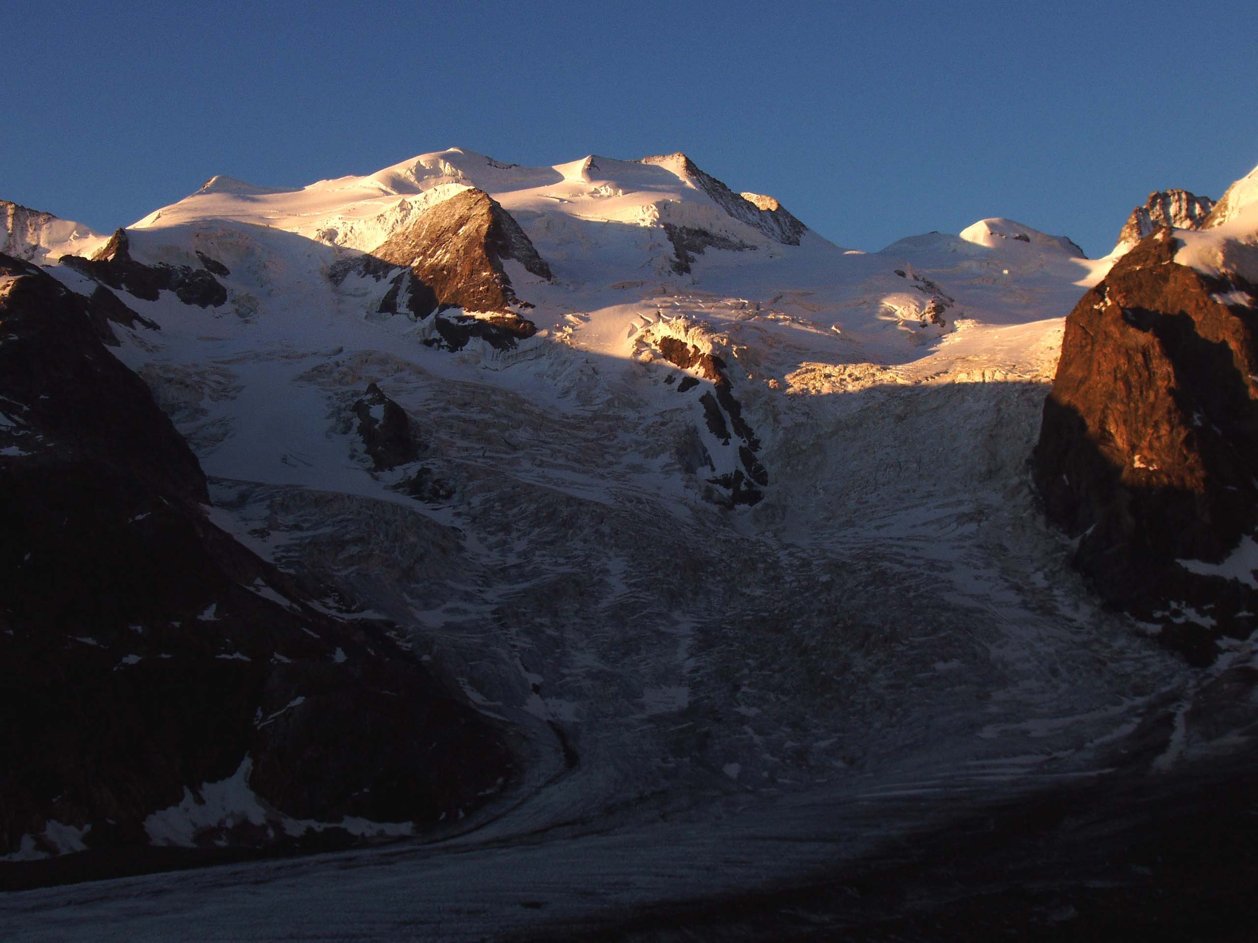 Sonnenaufgang an der viergipfeligen Bellavista, 3.922 m. Weiter rechts der verfirnte Piz Argient, 3.945 m, und die felsige Crast´ Agüzza, 3.854 m. Von den Gipfeln zieht der Morteratschgletscher herunter. Foto vom 30.06.2005, 5:45 Uhr, gesehen von der Chamanna dal Boval, 2.495 m. Sunrise on Bellavista, 30.06.2005.Photo was taken from Boval-hut, 2.495 m.